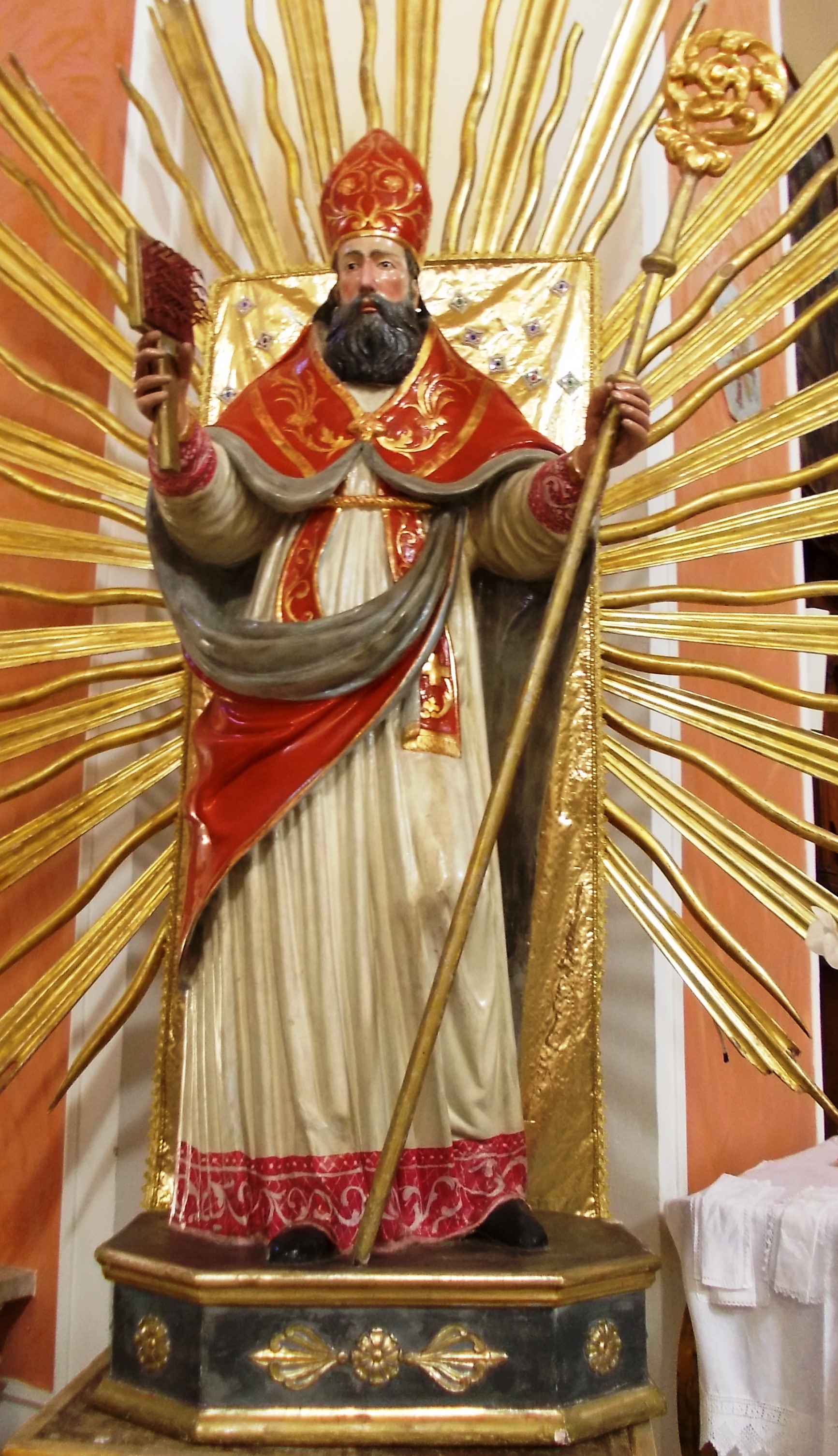 Statua di San Biagio nella Collegiata di San Martino, Cerreto Sannita.